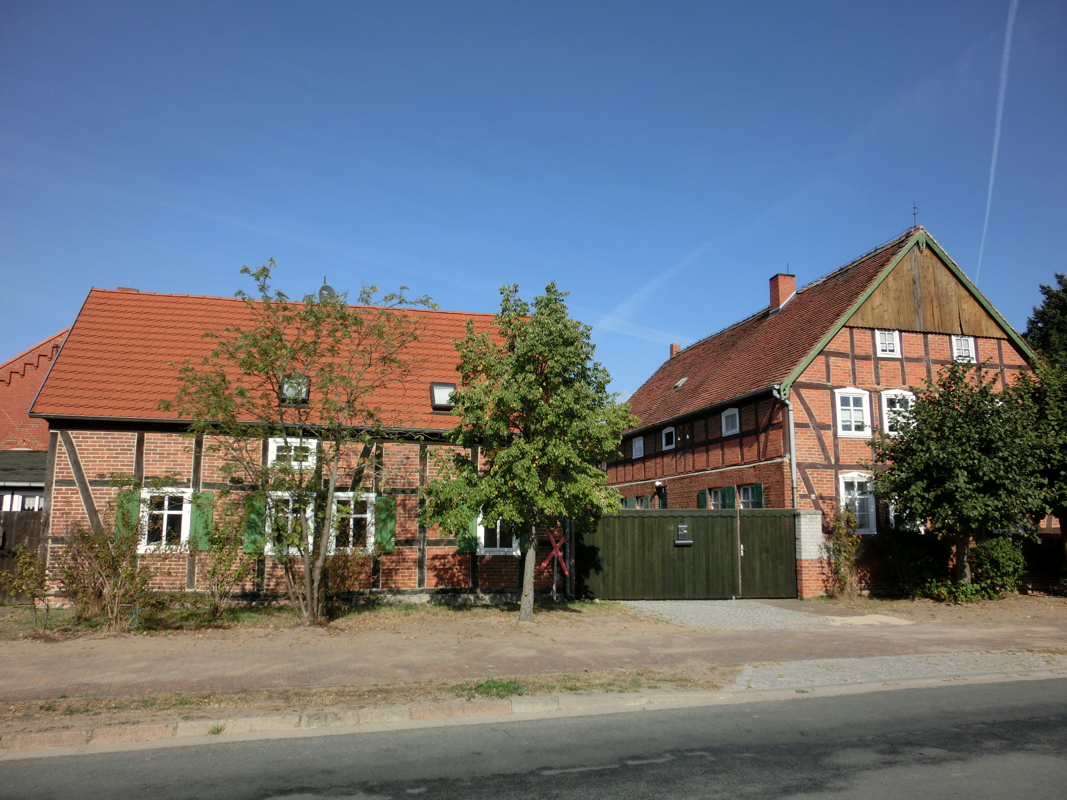 Baudenkmal, Erfassungsnummer 094 50279